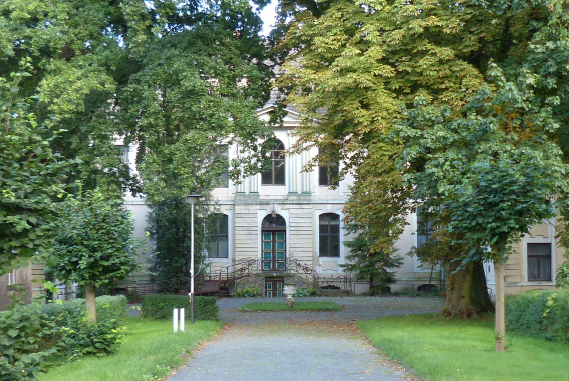 Die leicht abfallende Zufahrt zum Portal des Schlosses wird beiderseits von alten (und nachgepflanzten) Bäumen gesäumt, deren Gezweig und Blattwerk ihr im Sommer einen Anflug von Romantik verleihen.